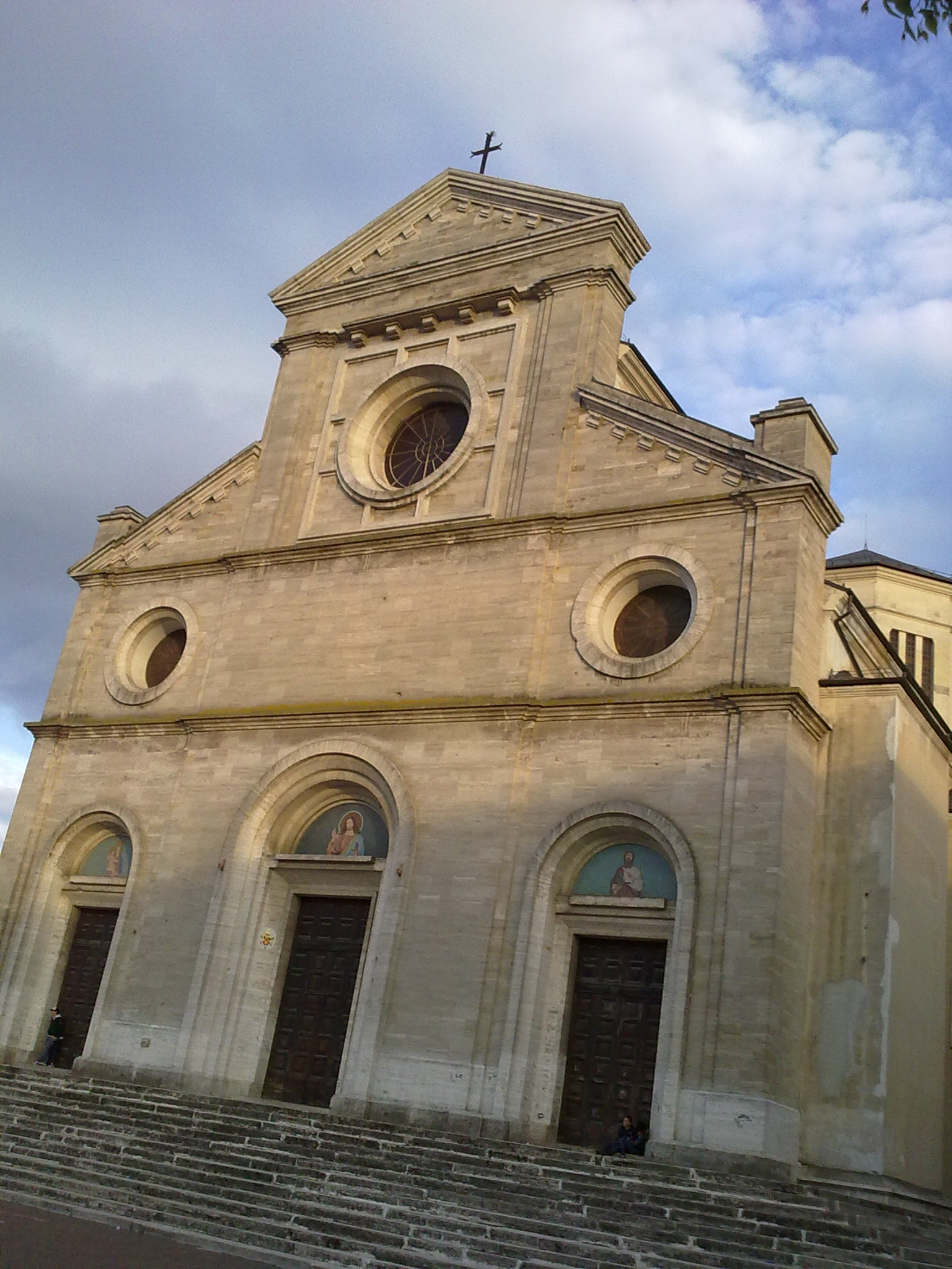 La foto ritrae la facciata della Cattedrale dei Marsi. Opera propria.